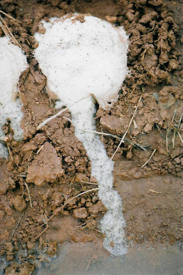 Eupemphix nattereri